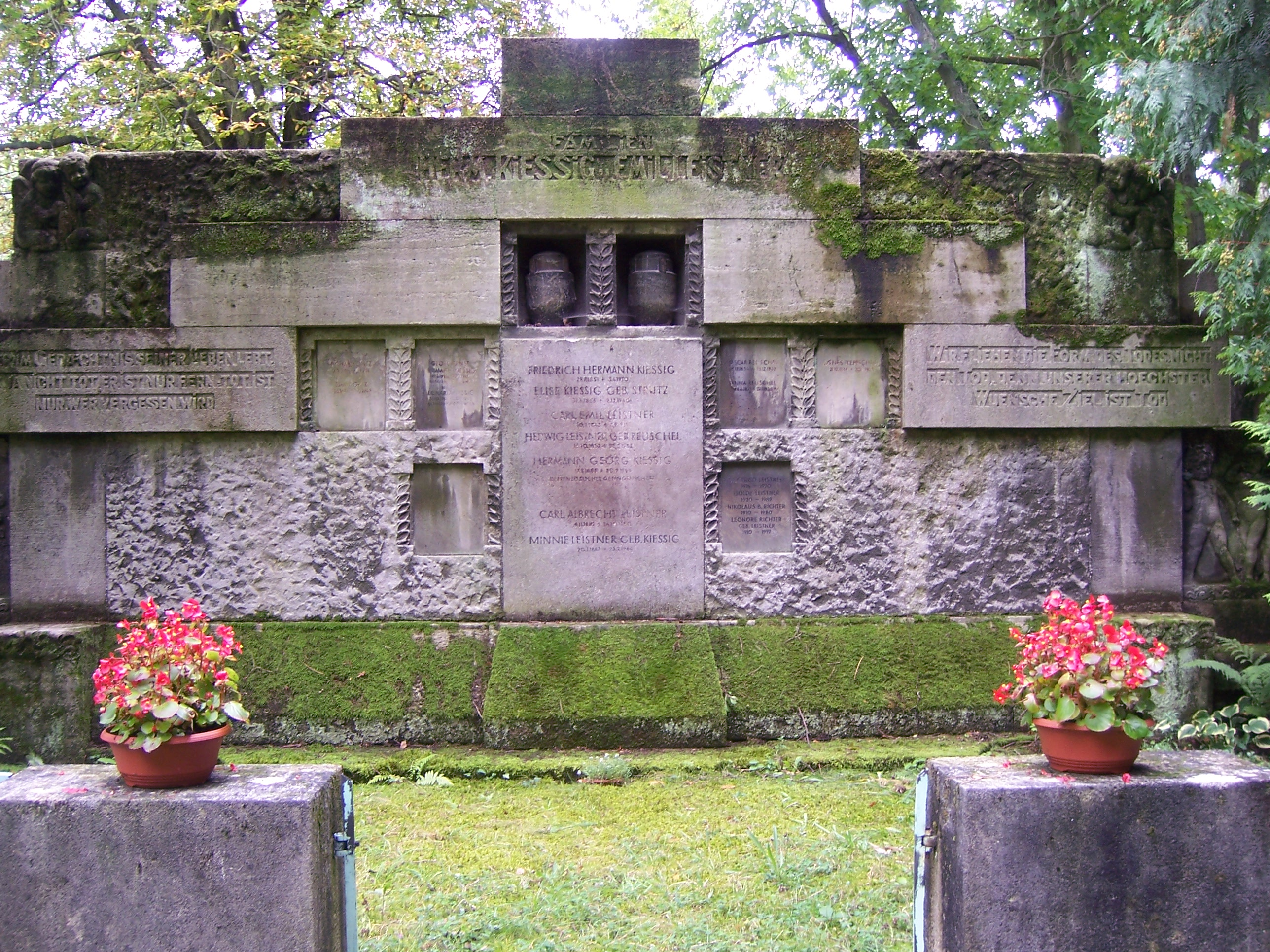 Grabstätte Albrecht Leistner und Angehörige, Südfriedhof Leipzig, Abt. V